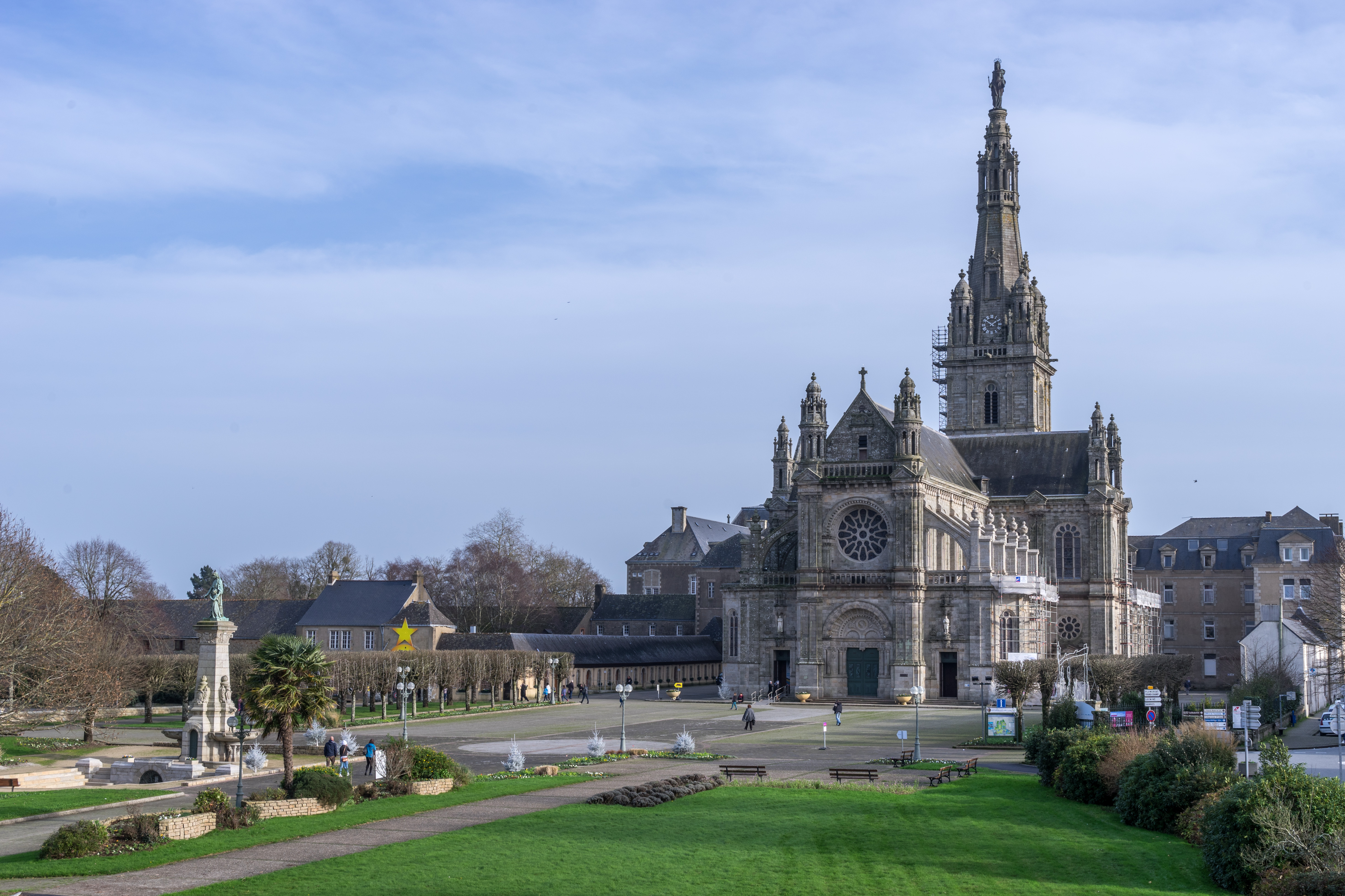 Sainte Anne Auray - Vue Ensemble